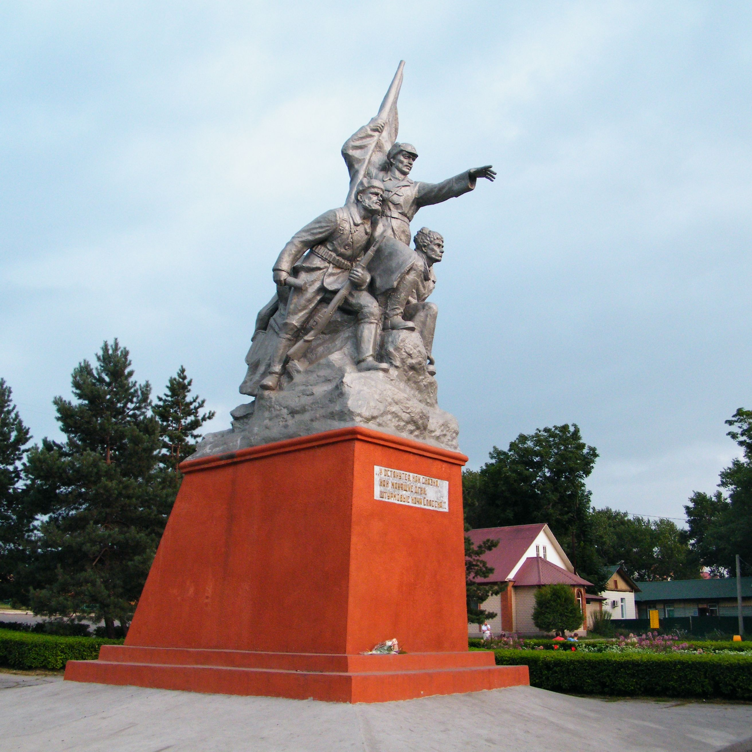 Город Спасск-Дальний, памятник красноармейцам